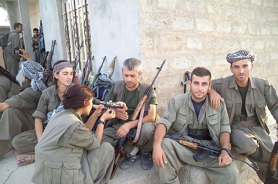 YPG